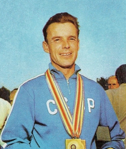 MUNCHEN/MONACO '72-PANINI-Figurina n.164- TSURANOV-URSS-TIRO-Recuperata